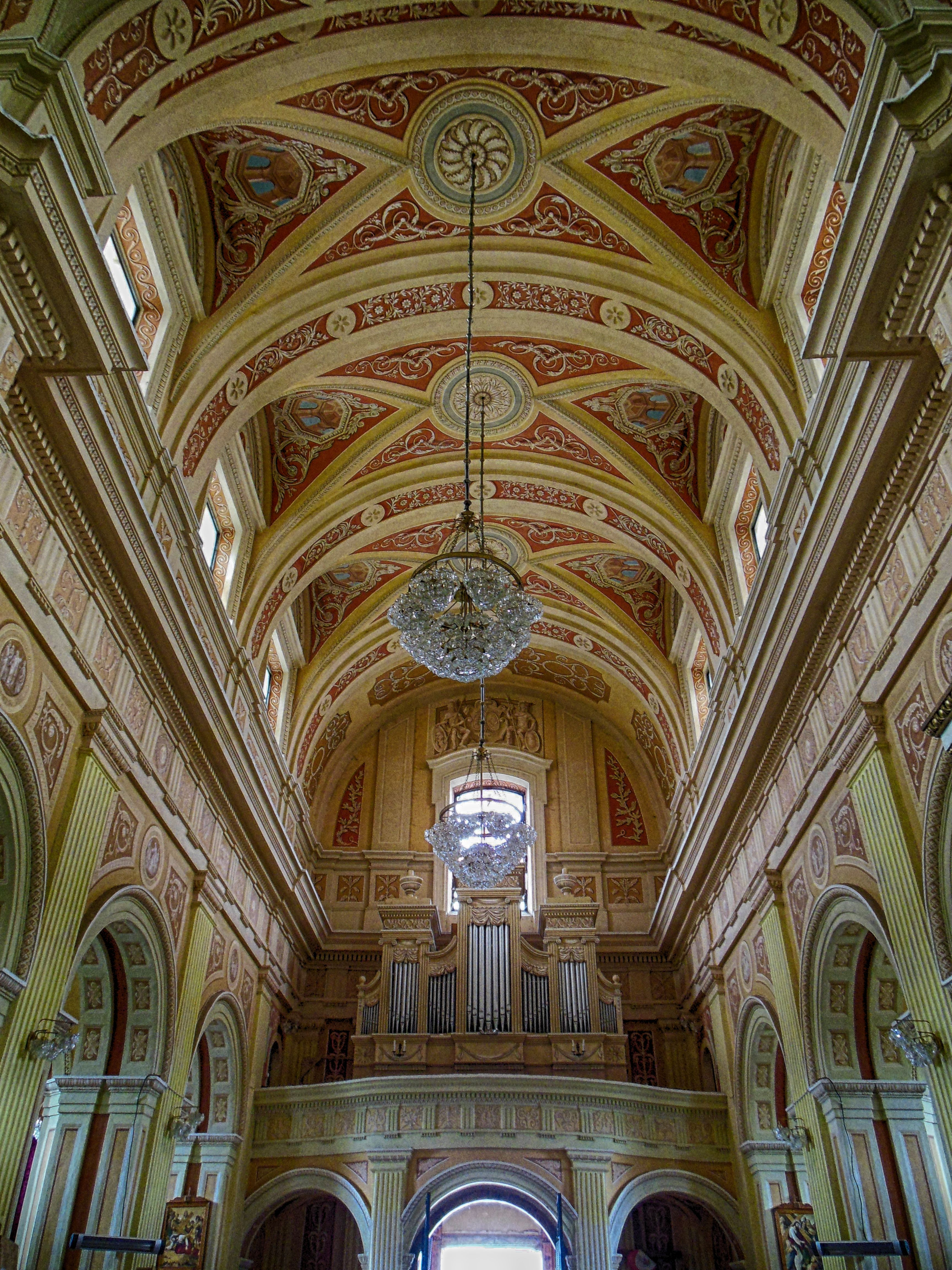 Беларуская (тарашкевіца): Касьцёл Сьвятога Тадэвуша, росьпісы інтэр’ера. в. Лучай This is a photo of Belarusian heritage monument. Reference number: 212Г000596 ( WLM)